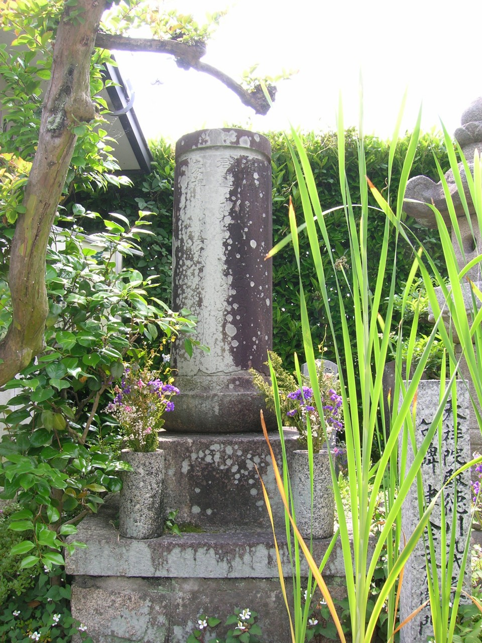 "Tsugane-kun Iaihi" is Tsugane Taneomi's Waka inscription. Loc: Tobishima, Aichi Prefecture, Japan. ja:「津金君遺愛碑」は津金胤臣没後に建てられた歌碑。 撮影場所 愛知県海部郡飛島村